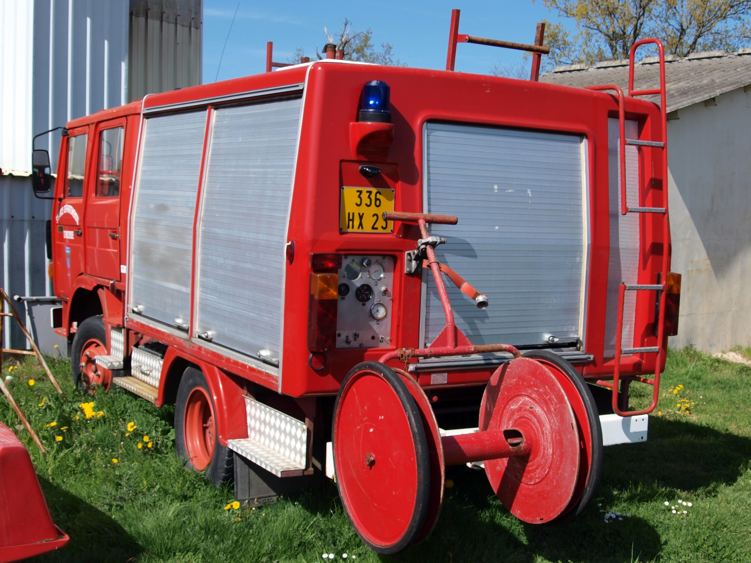 Berliet 130 B9, Département Creuse, France